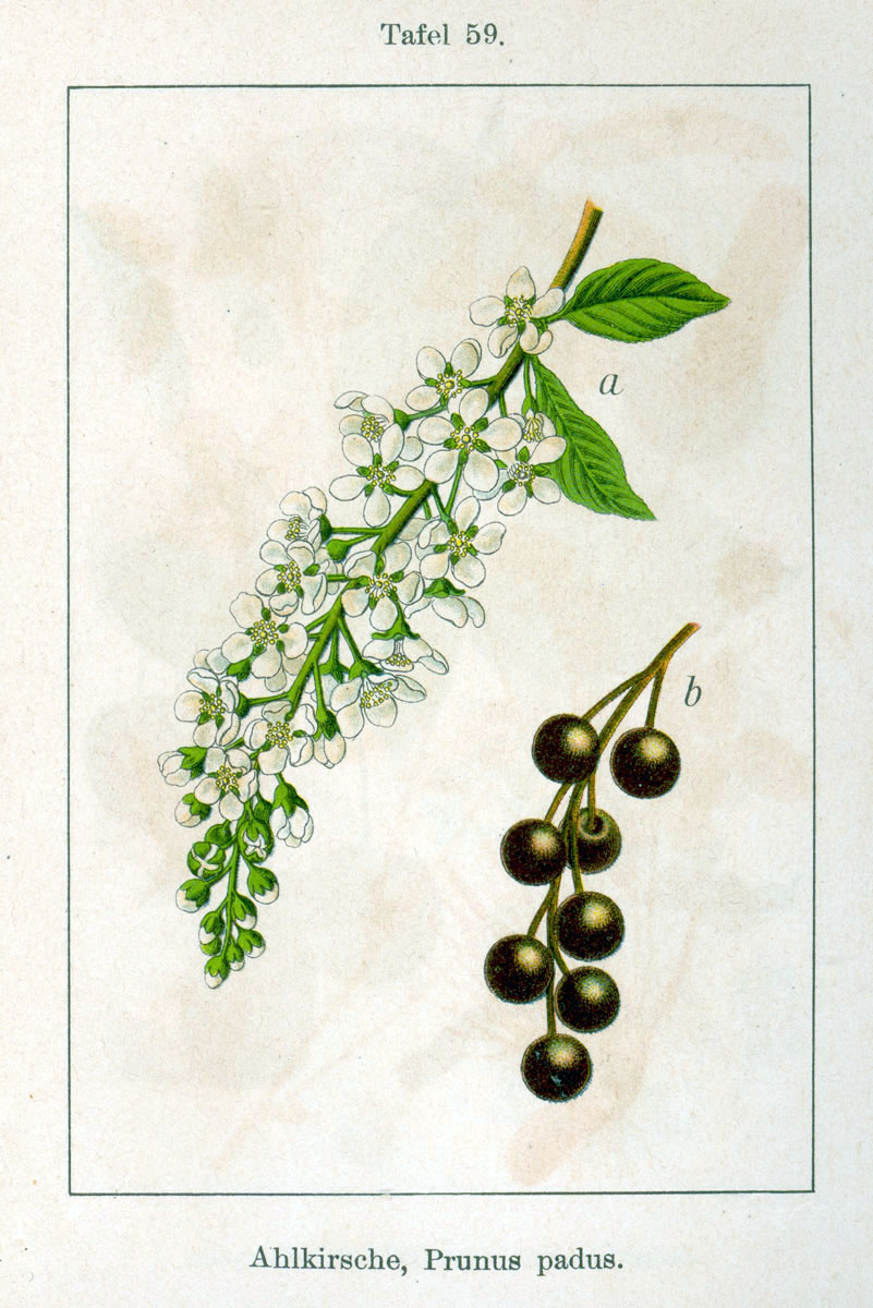 Padus avium var. avium, syn. Prunus padus L. Original Description Ahlkirsche, Prunus padus